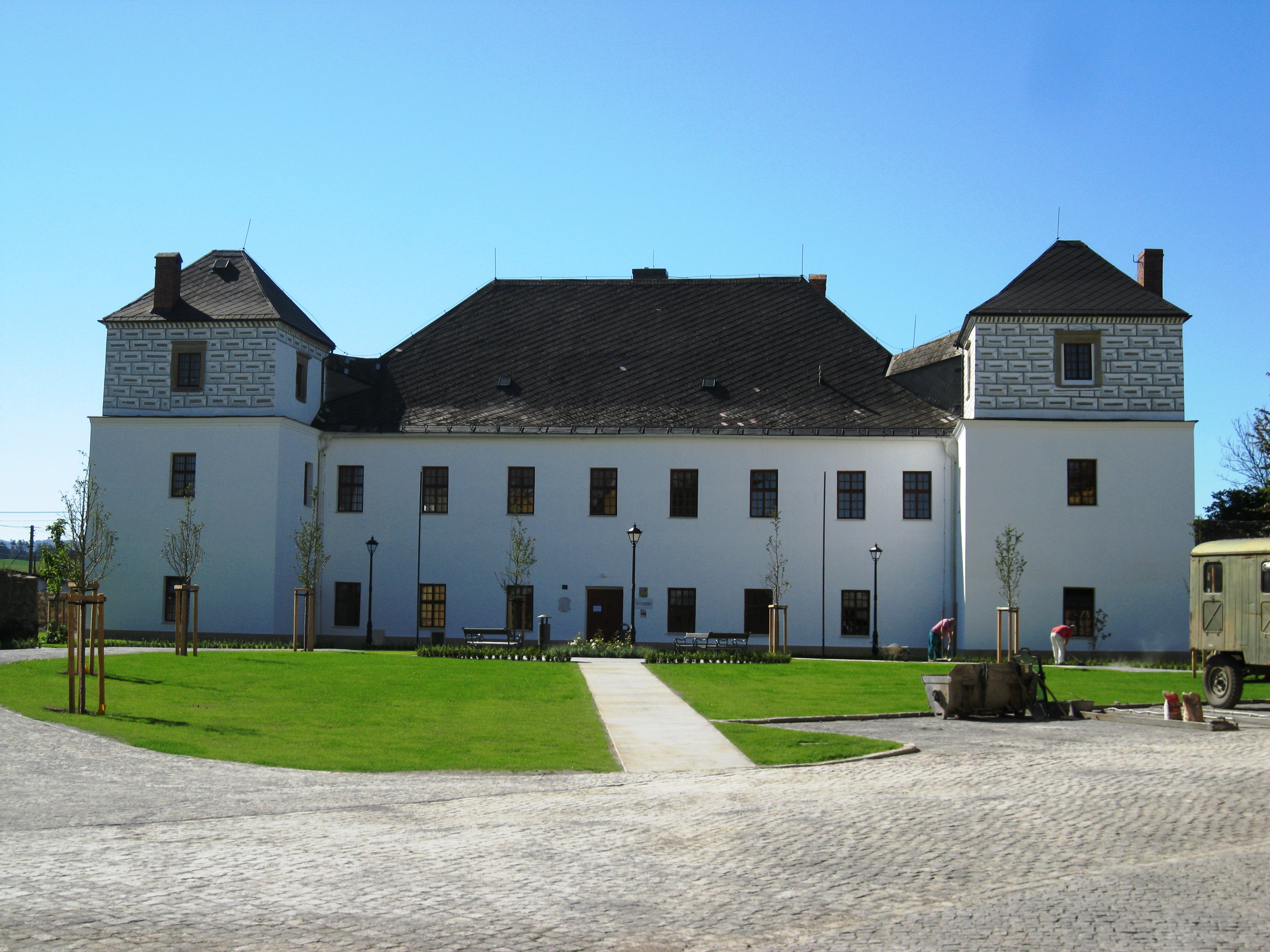 Zámek s parkem Vidnava, Kostelní 1, Vidnava